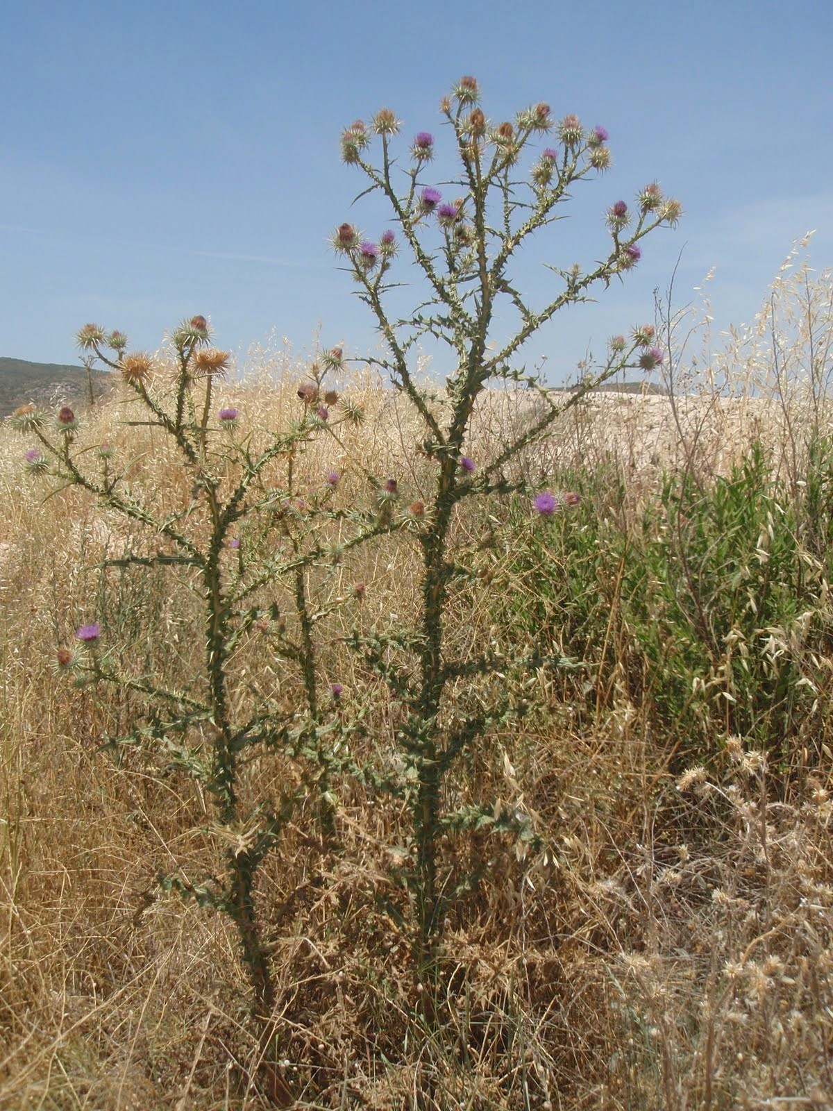 Onopordum corymbosum (Cardo borriquero) - Vista general en antesis. - Campo de tiro de pichón y circuito de motos en Banyeres, Provincia de Alicante (España).